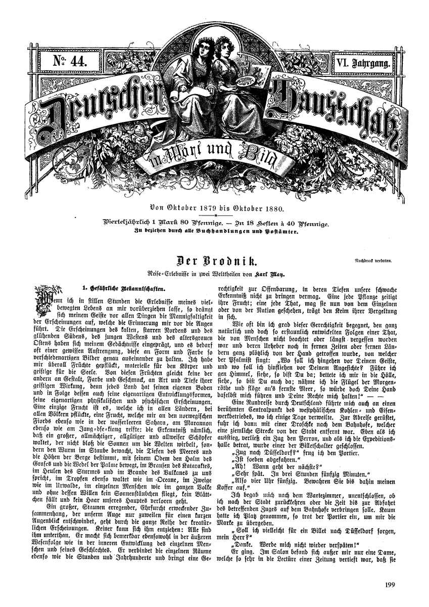 Der Brodnik